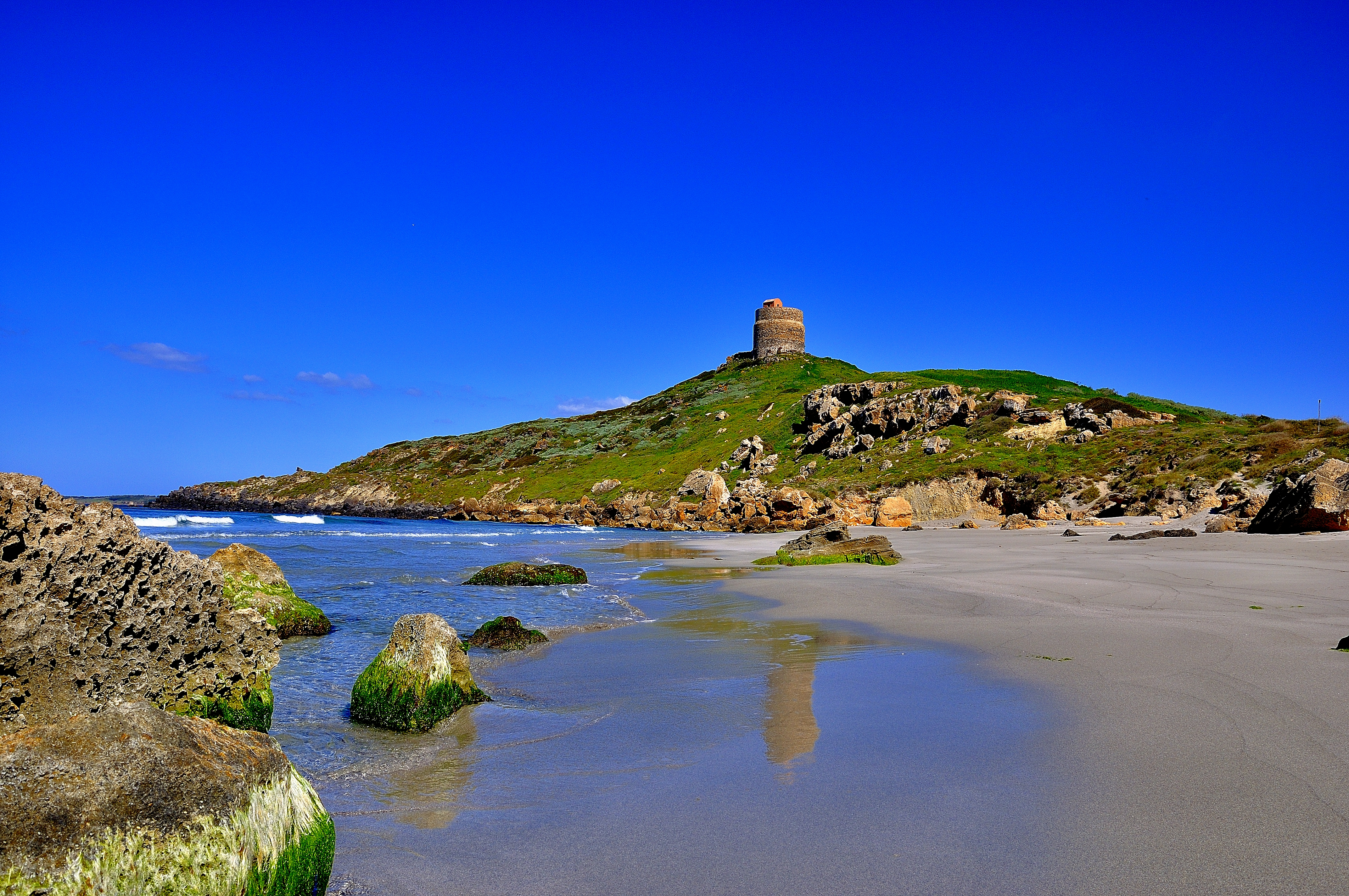 Torre costiera